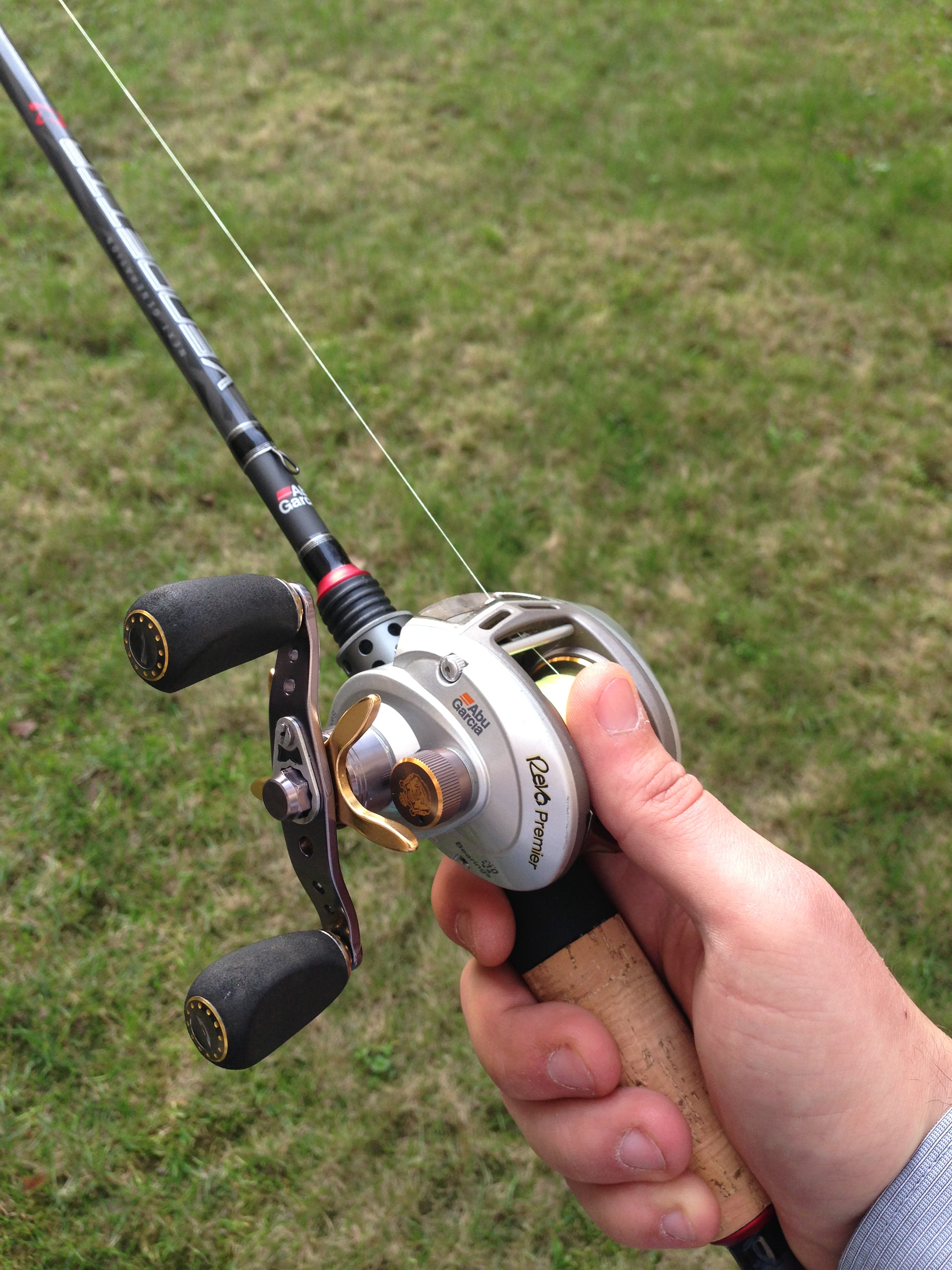 Abu Garcia Revo Premier